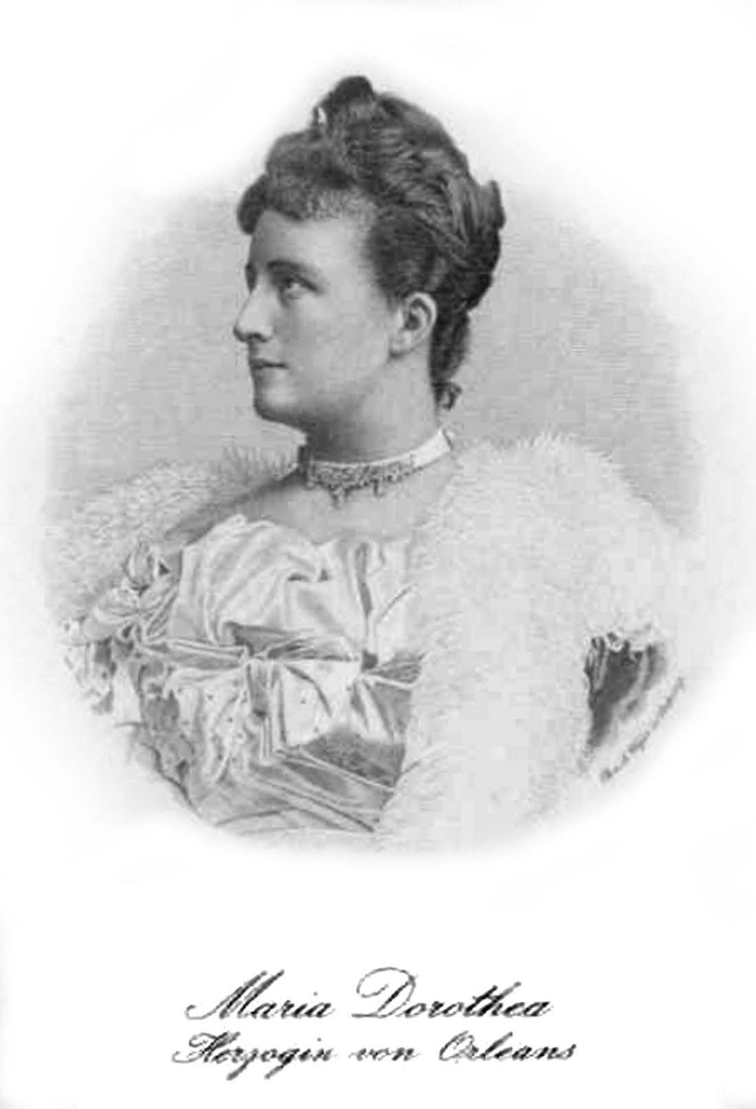 Maria Dorothea von Österreich (1867-1932), Herzogin von Orleans